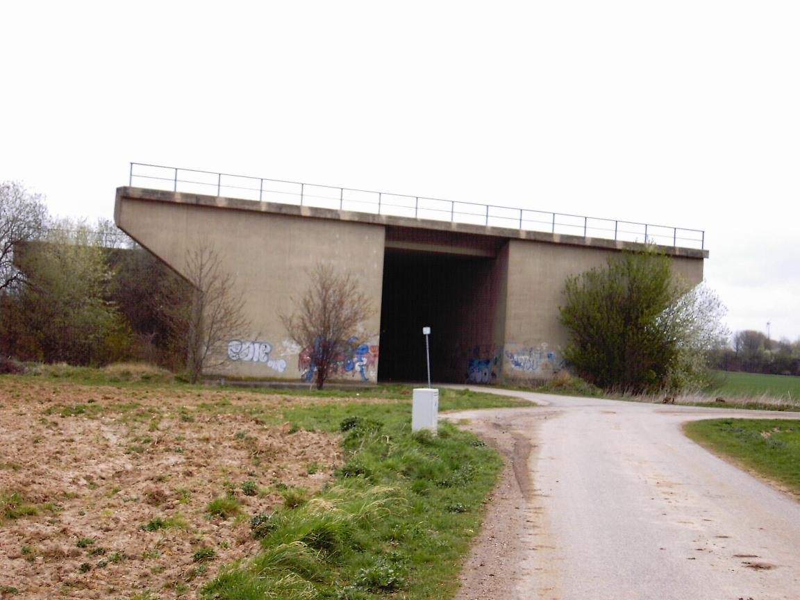 Brücke A56/B56 bei Euskirchen